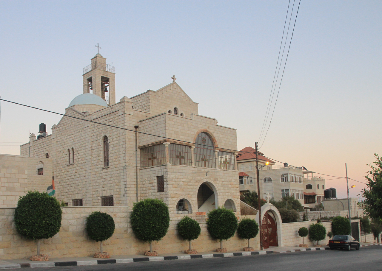 Taybeh, Palästina.